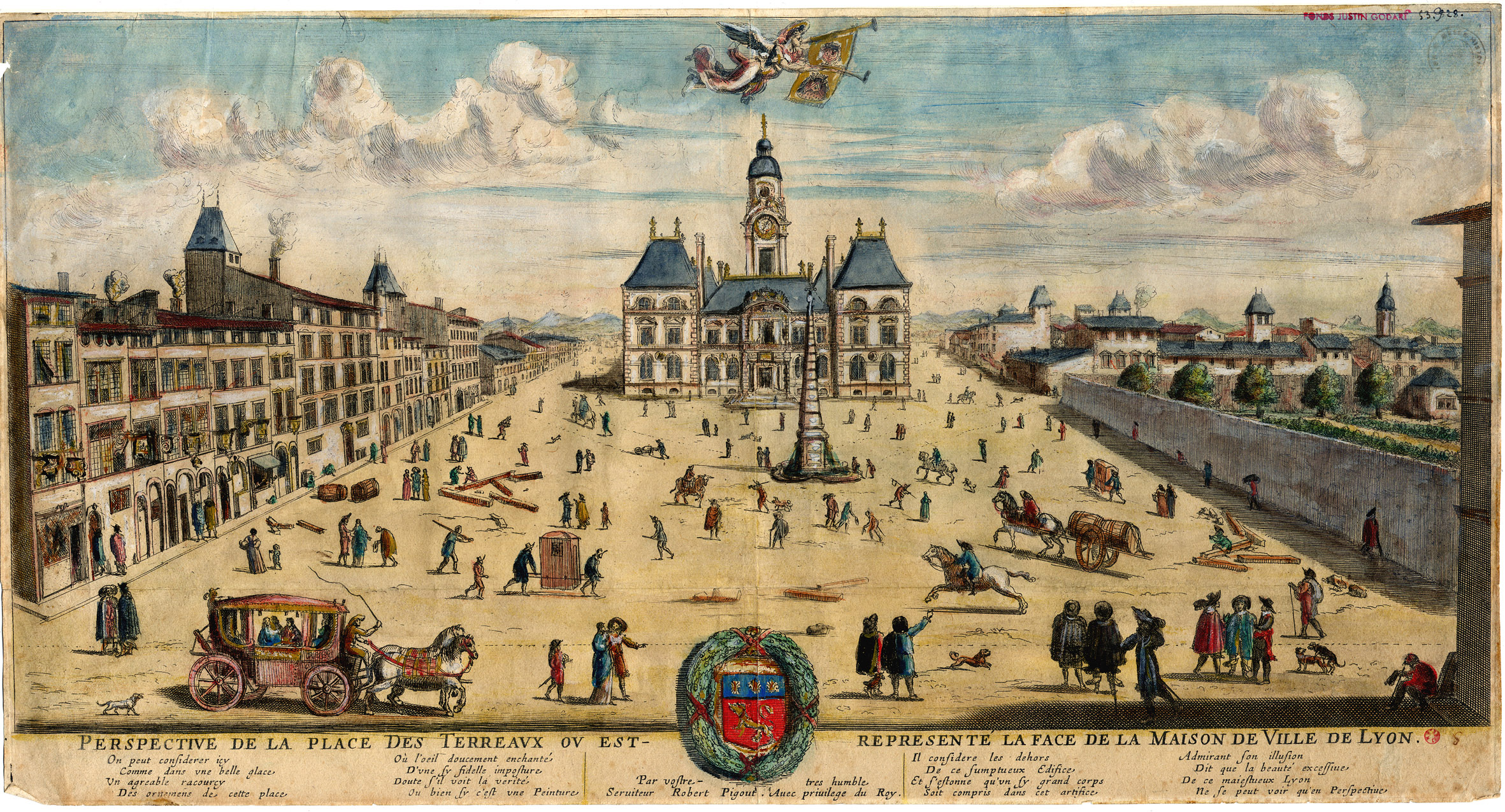 Perspective de la place des Terreaux où est représentée la face de la maison de Ville de Lyon, gravure, 1653. (9)53.928 musées Gadagne d'histoire de Lyon